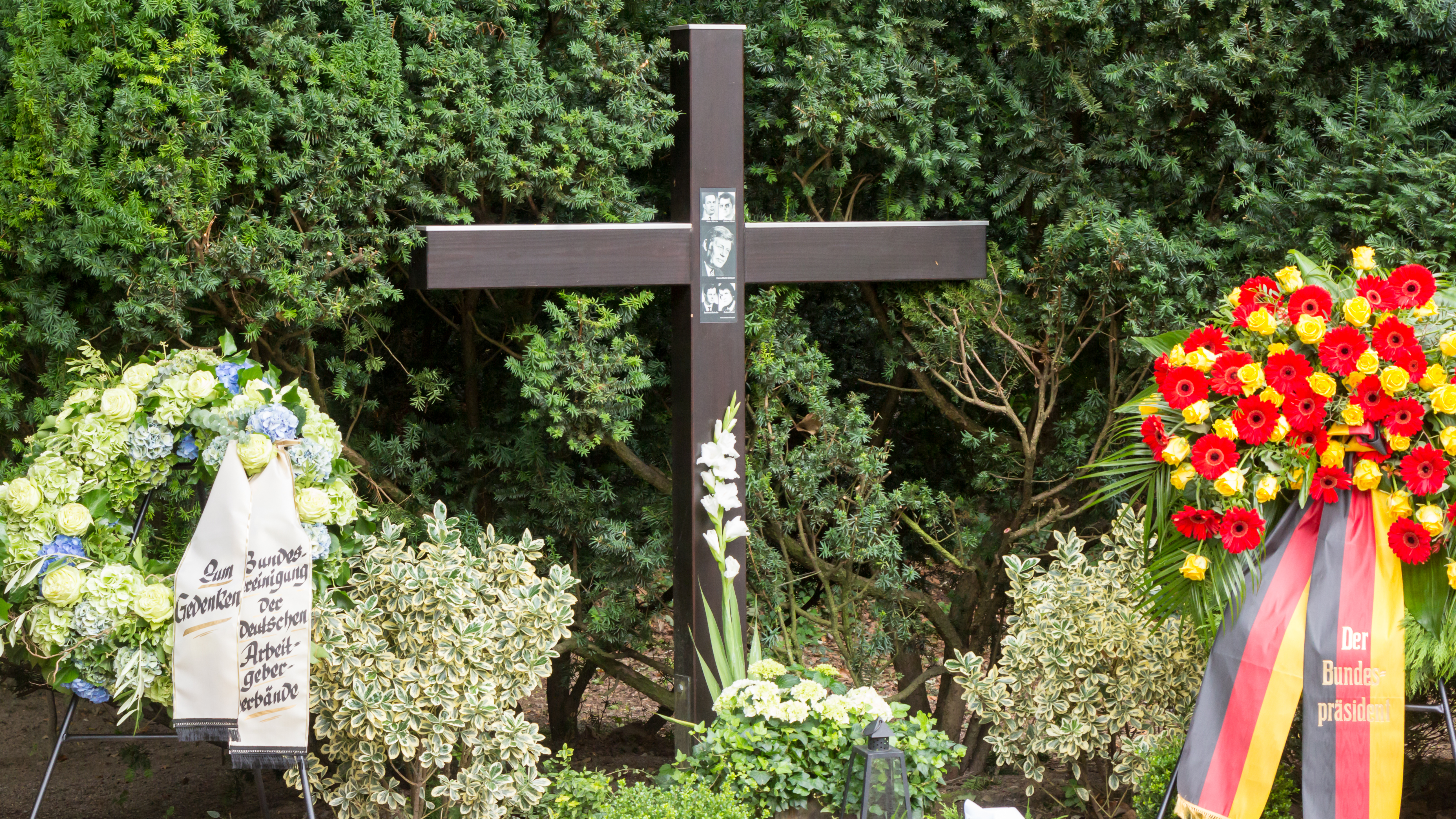 Kranzniederlegung 40. Jahrestag Attentat auf Hanns Martin Schleyer